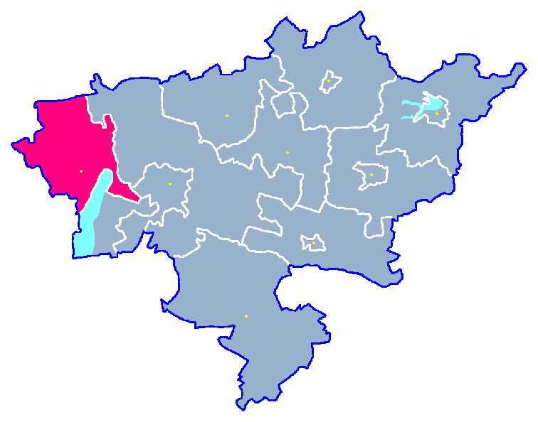 Locator maps for communes in województwo zachodniopomorskie : Kobylanka gm.png (podział na gminy)